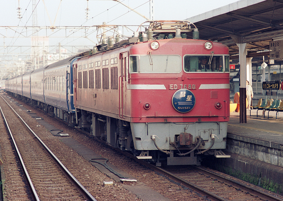 JR九州 ED76 80けん引 14系15形客車 寝台特急「彗星」